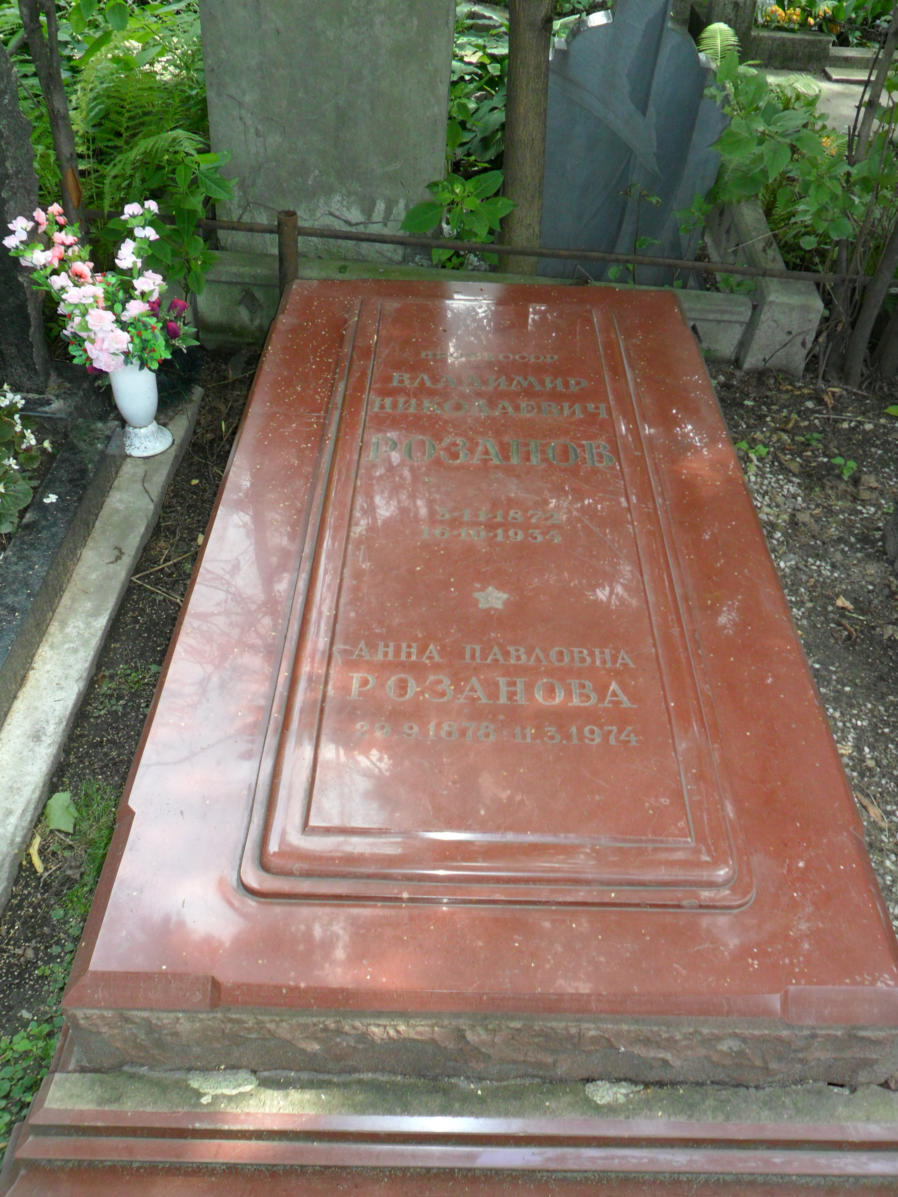 Могила врача В.Н. Розанова на Новодевичьем кладбище